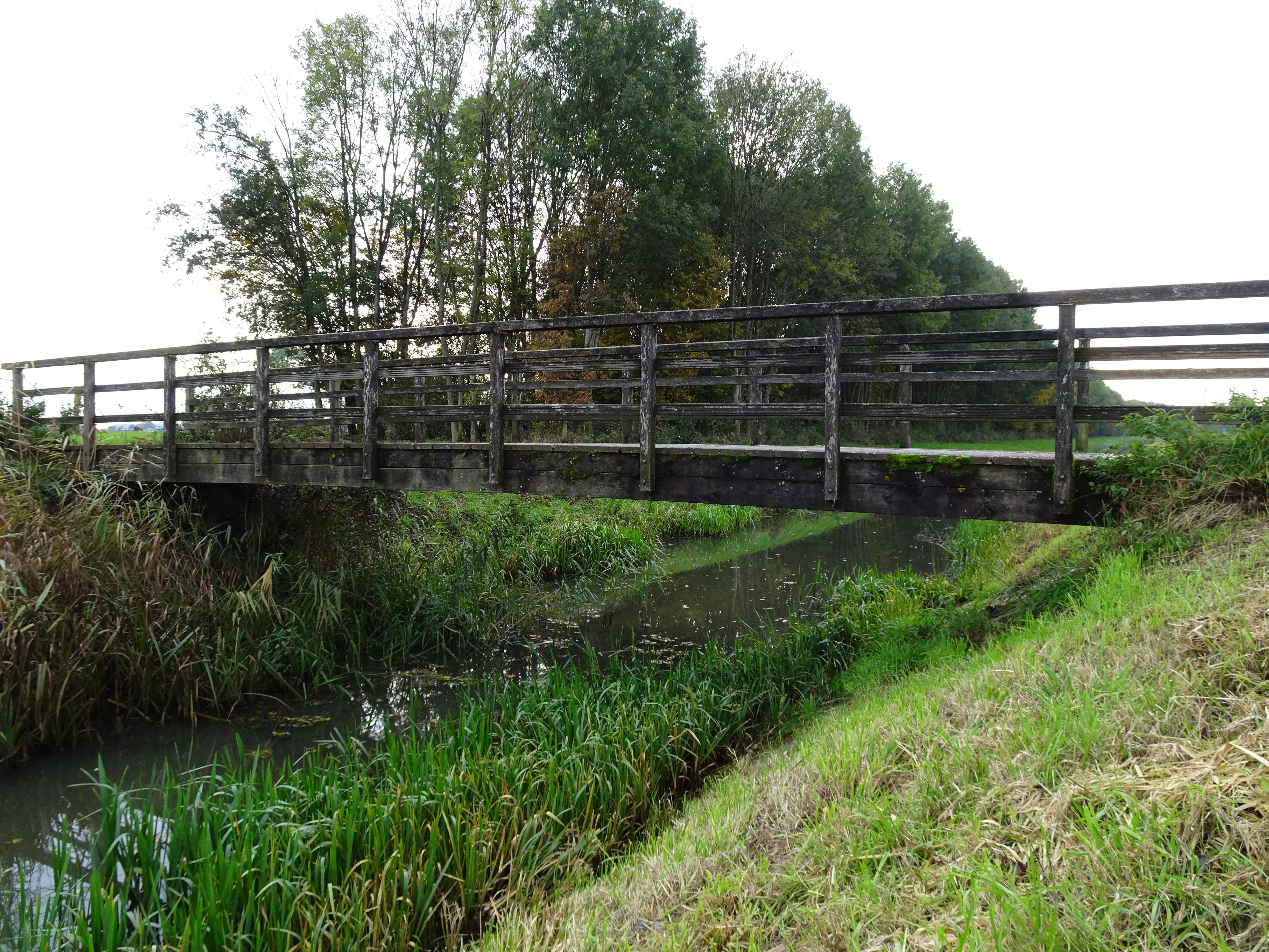 De Zwarte Brug over het Grenskanaal / de Berghse Wetering / Netterdensch Kanaal in 's-Heerenberg in de gemeente Montferland